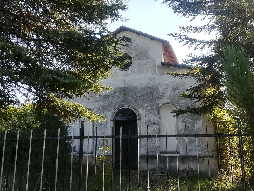 La chiesuola di campagna denominata “Madonna del Pozzo”, sorge a circa tre chilometri da Ortucchio sulla strada per Lecce dei Marsi